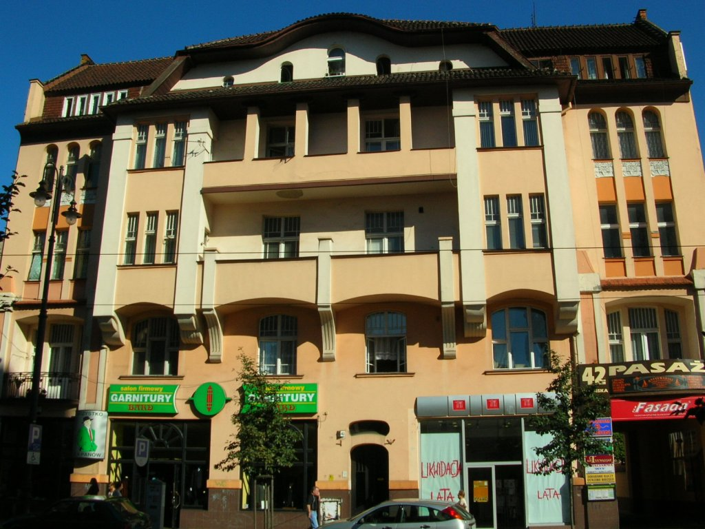 Kamienica ul. Gdańska 42 w Bydgoszczy